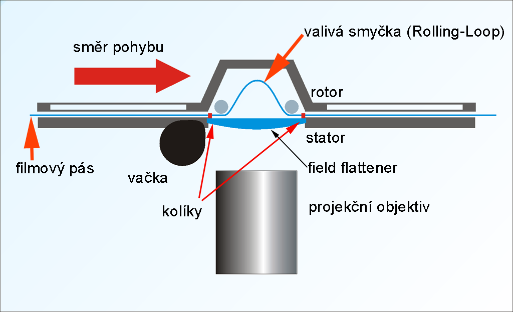 Schéma Rolling Loop mechanismu